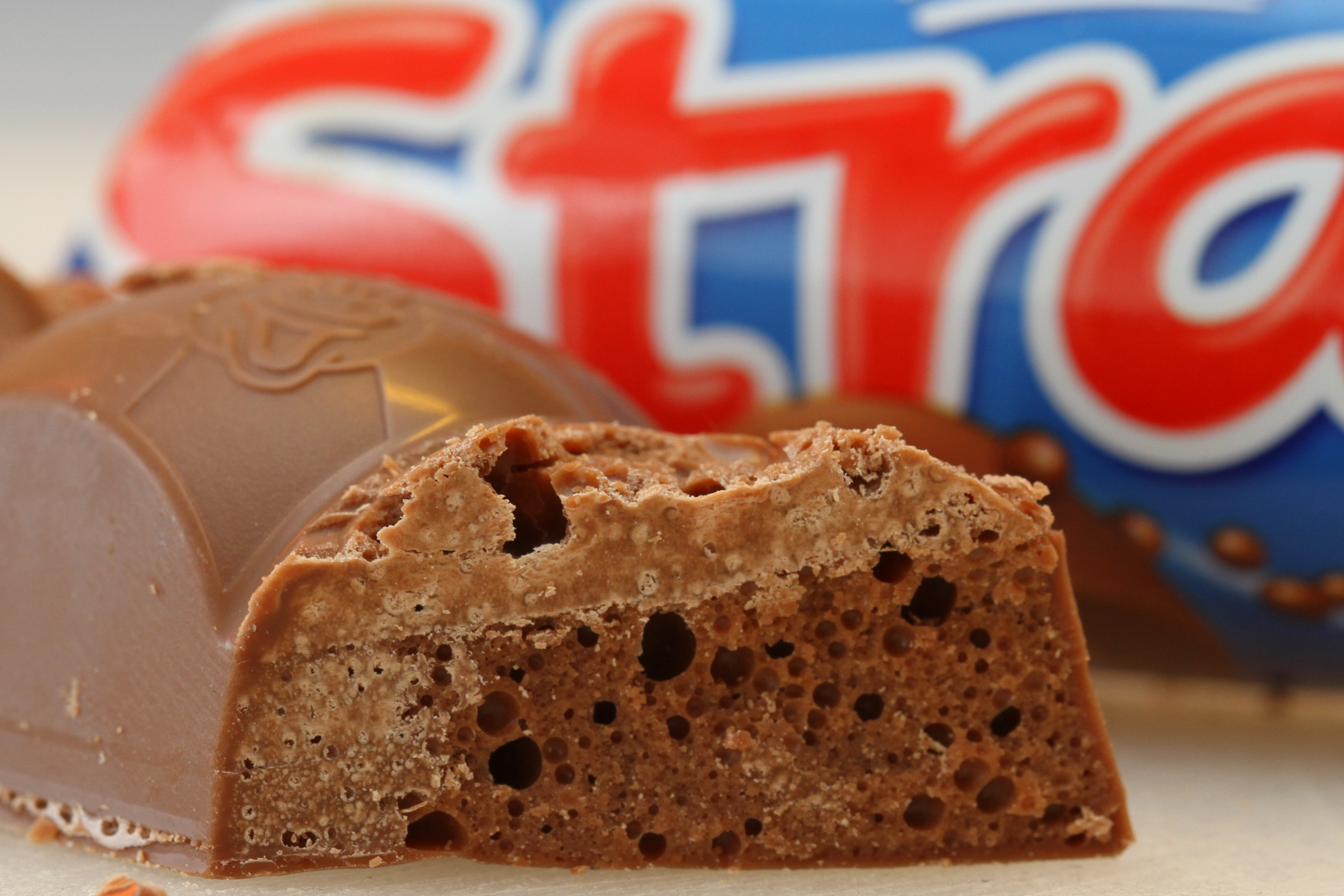 Sjokoladen Stratos.